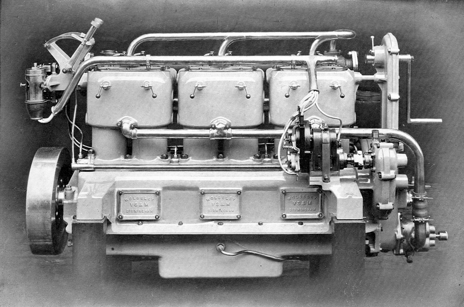 Wolseley 6-cylinder marine oil engine (Rankin Kennedy, Modern Engines, Vol V).jpg